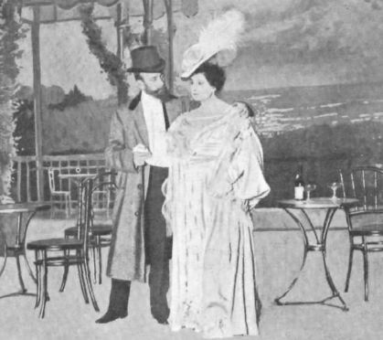 María Guerrero y Fernando Díaz de Mendoza en una escena de la obra de teatro La Princesa Bebé, de Jacinto Benavente